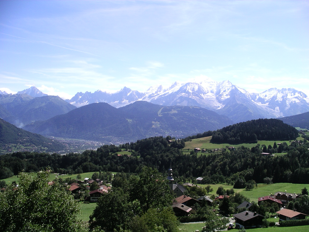 Le village de Cordon au premier plan avec la chaîne du Mont-Blanc en arrière-plan.